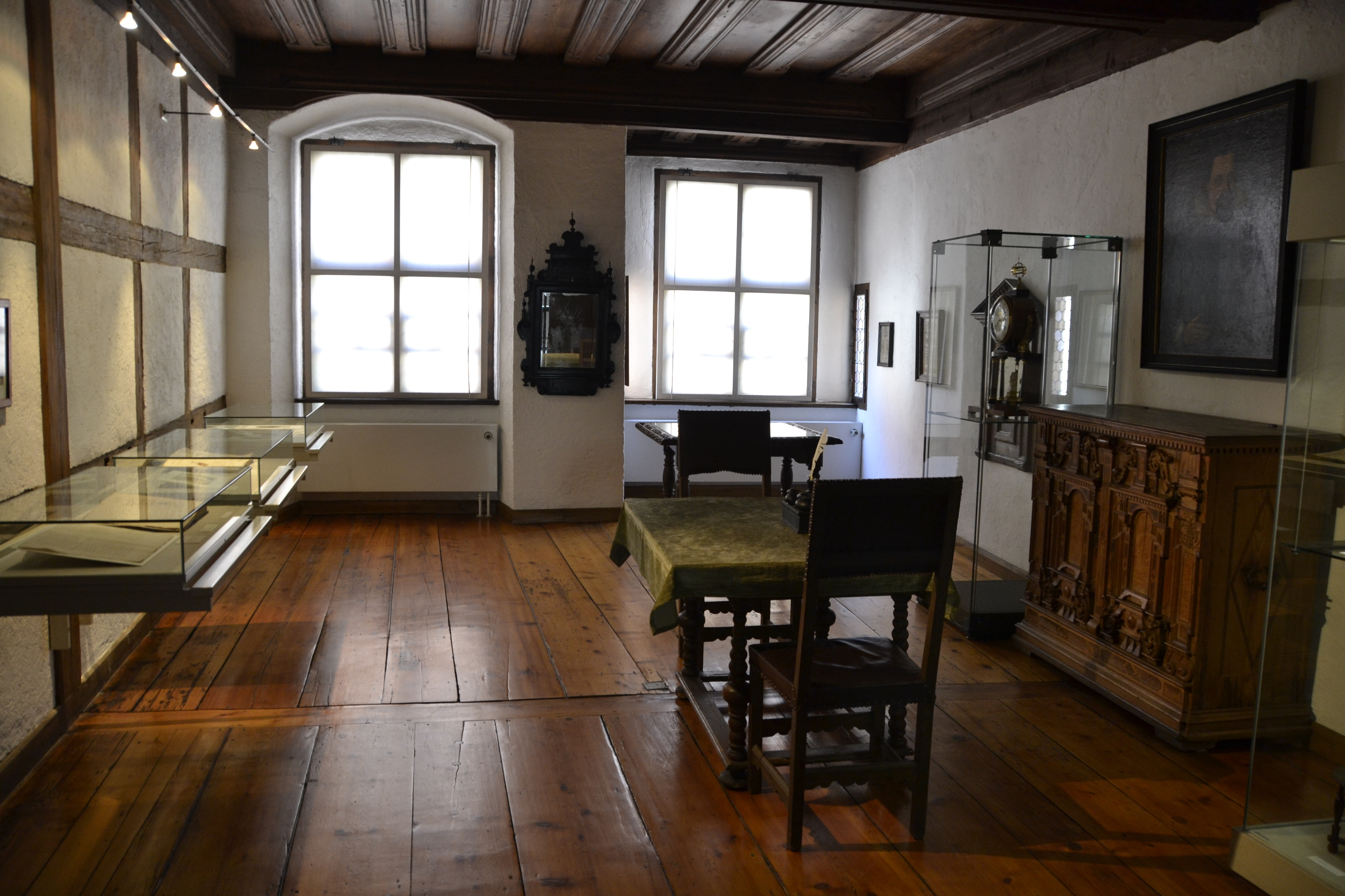 Das Kepler Gedächtnishaus in Regensburg, Bayern beherbergt ein Museum, das dem Leben des Johannes Kepler gewidmet ist.